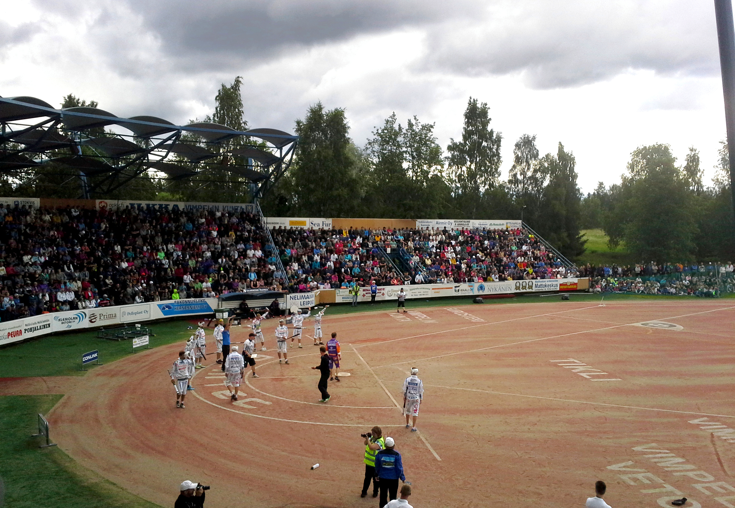 Vimpelin Veto - Sotkamon Jymy ottelussa 19.7.2015 oli yhteensä 3570 katsojaa.